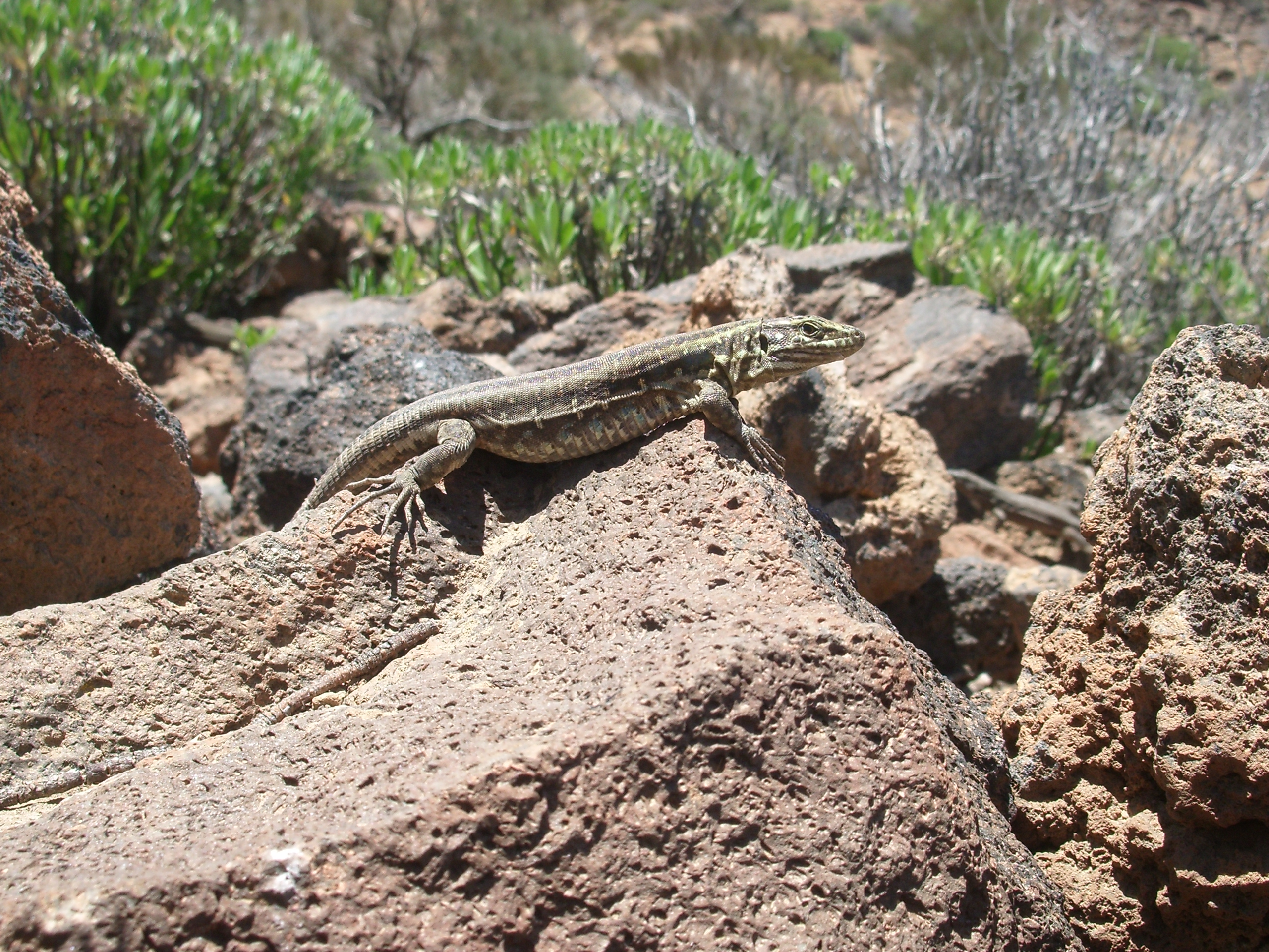 Juvenil de Gallotia galloti tomando el sol en el Parque Nacional del Teide